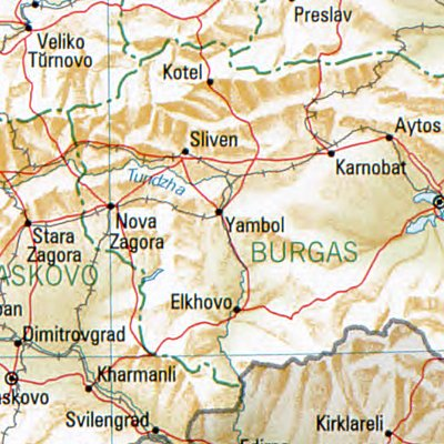 Jambol - Lage des Ortes in Bulgarien